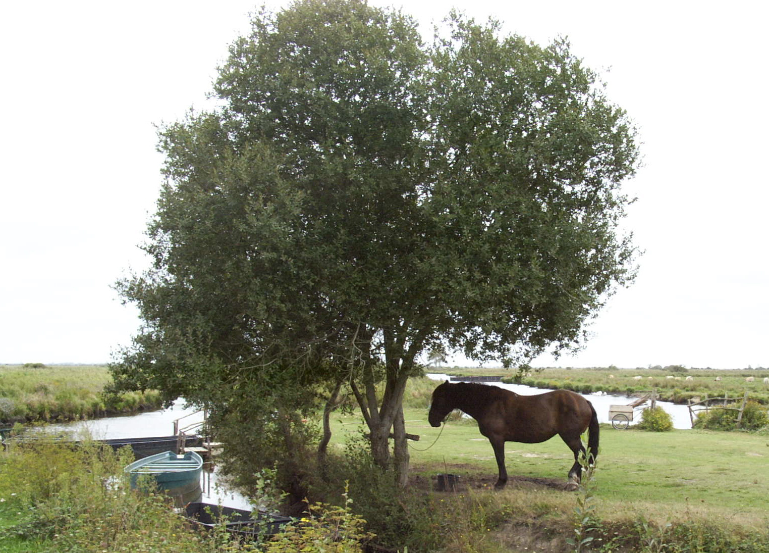 Landschaftsszene in der Briére